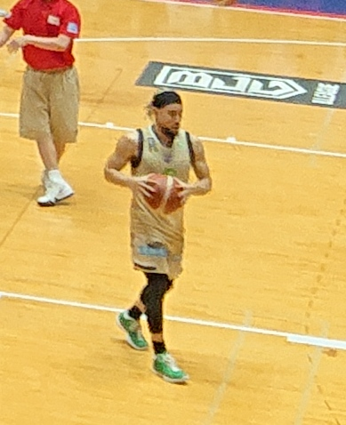 Bリーグチャンピオンシップ2018 - 2019 琉球ゴールデンキングスvs名古屋ダイヤモンドドルフィンズ 第二戦